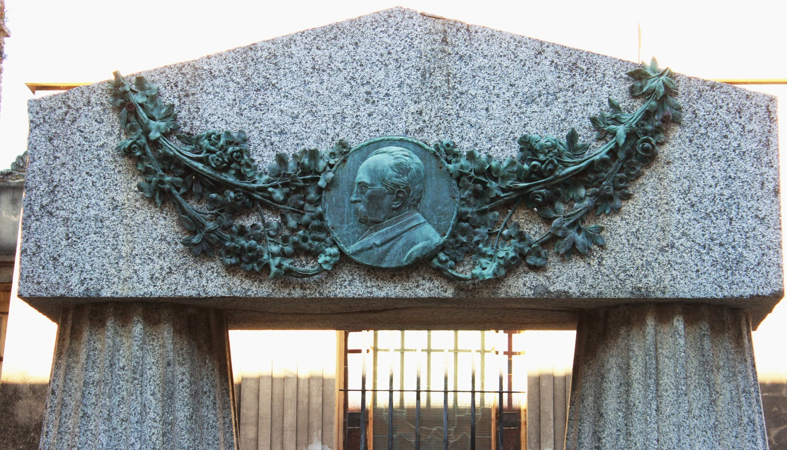 Retrato de Torres ubicado en la parte superior de su sepulcro.